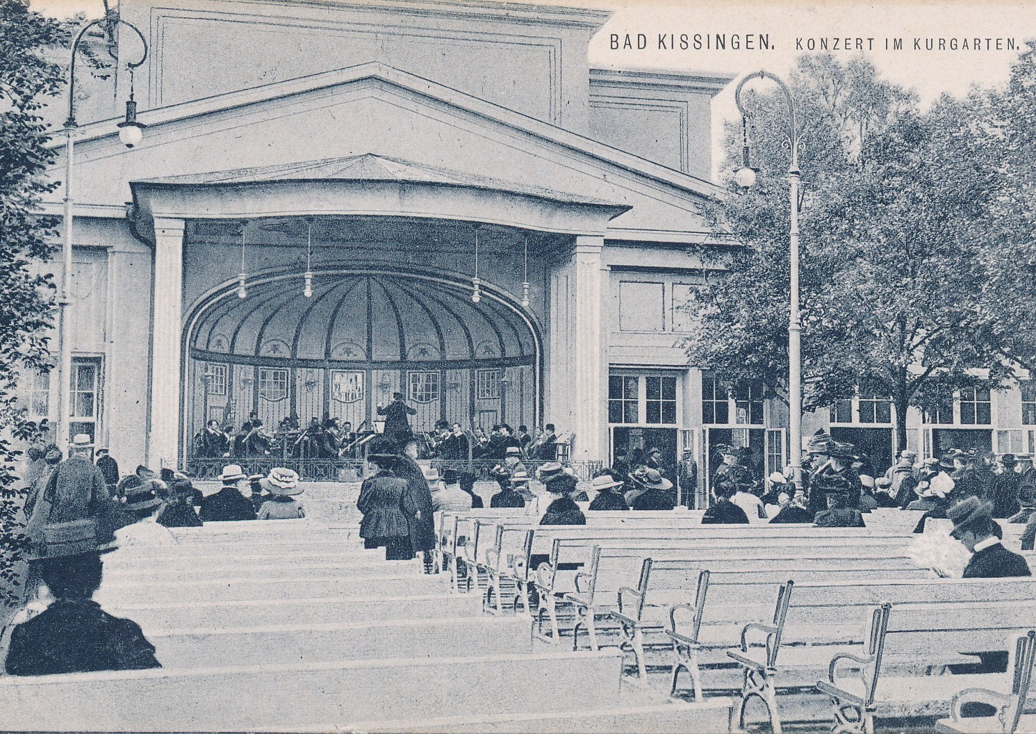 Besucher des Kurkonzerts vor der drehbaren Konzertbühne an der Bad Kissinger Wandelhalle (1911).